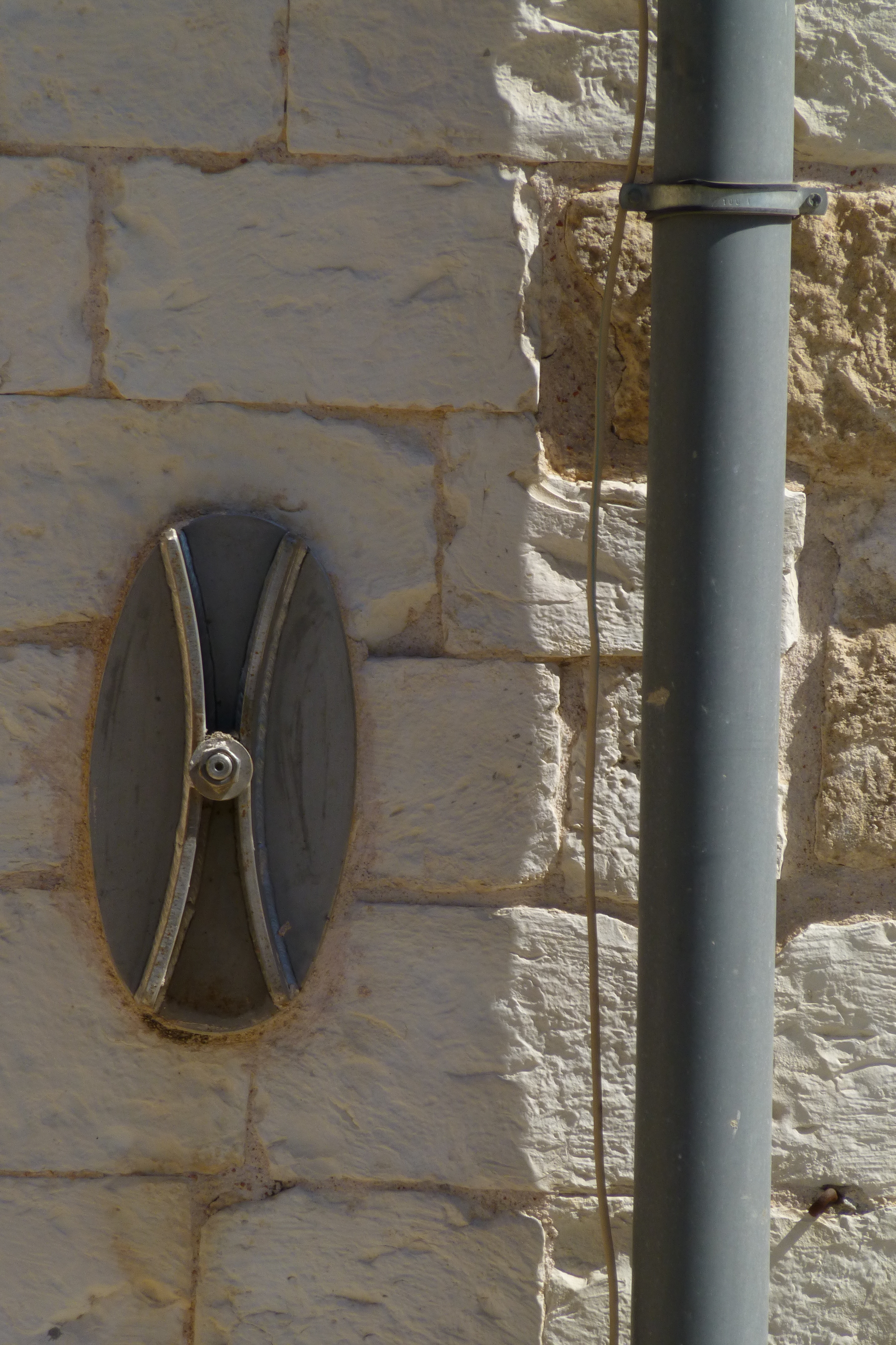 מוזיאון העיר הוא מוזיאון העוסק בתרבות אורבנית ובתיעוד ובהצגת ההיסטוריה של העיר חיפה, . המוזיאון נפתח בנובמבר 2000, והוא ממוקם במבני בית העם הטמפלרי ובית הספר הטמפלרי. המוזיאון הוא חלק ממוזיאוני חיפה. בית העם הטמפלרי הוקם בשנת 1869 והיה הבניין הראשון שהקימו הטמפלרים בארץ.